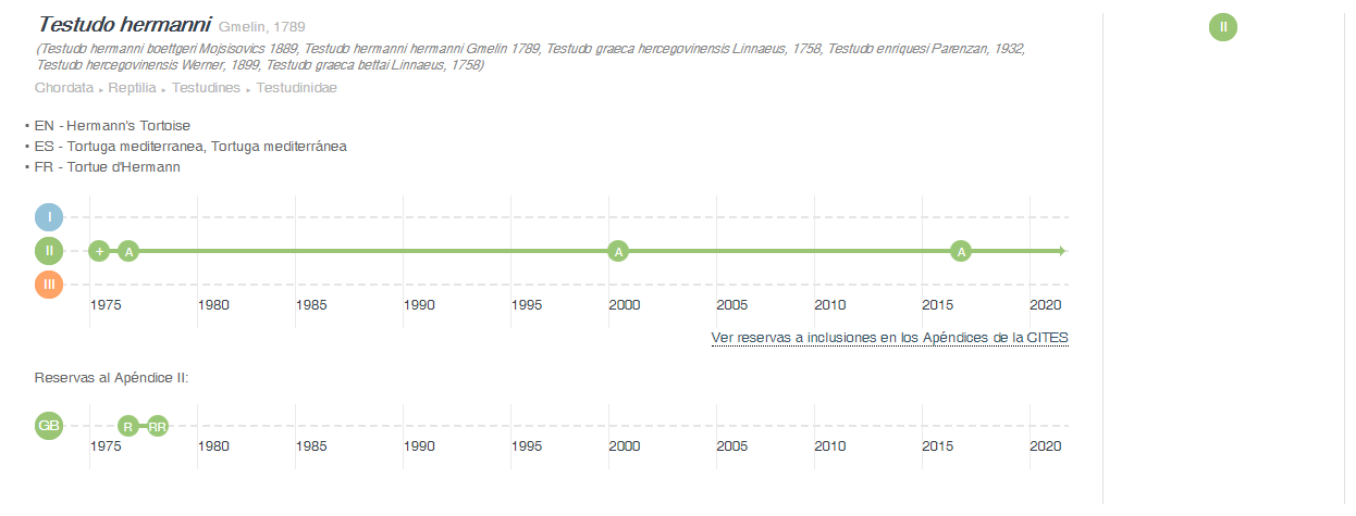 Status of Testudo Hermanni - CITES database